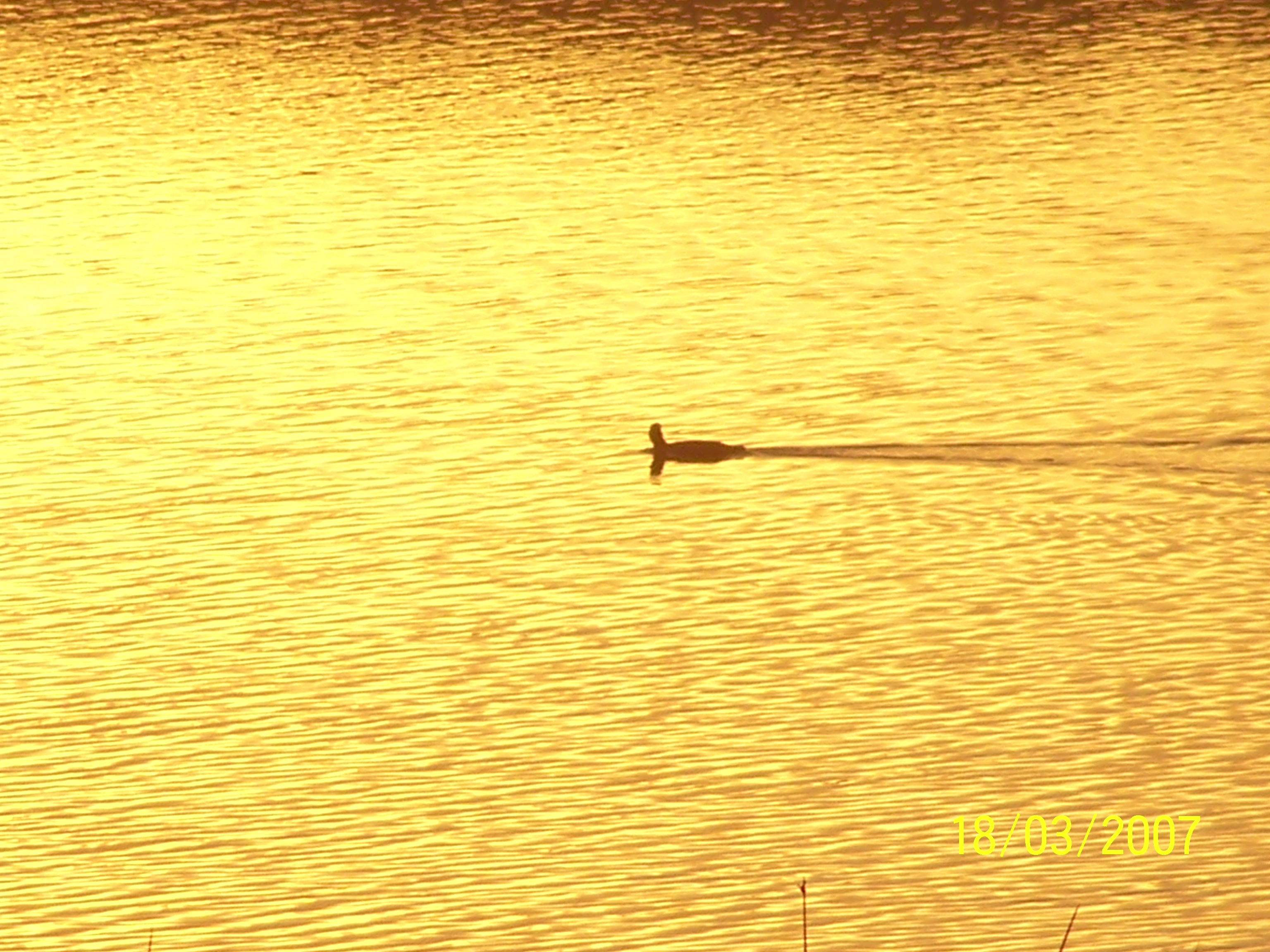 Pato liles en rio de Taucu